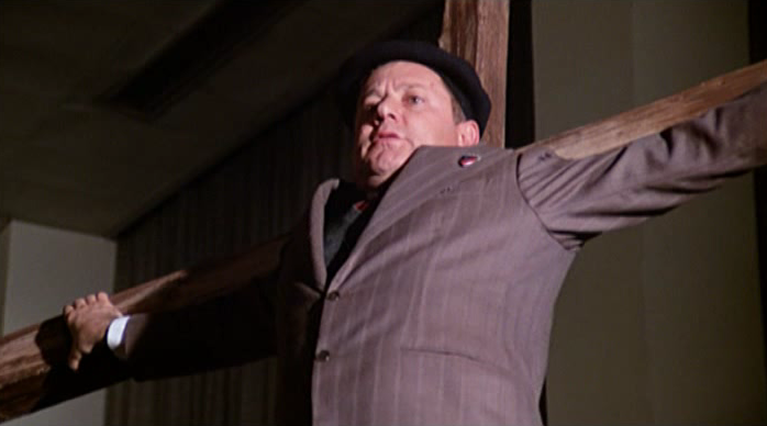 Italian actor Paolo_Villaggio in a scene of the film Fantozzi